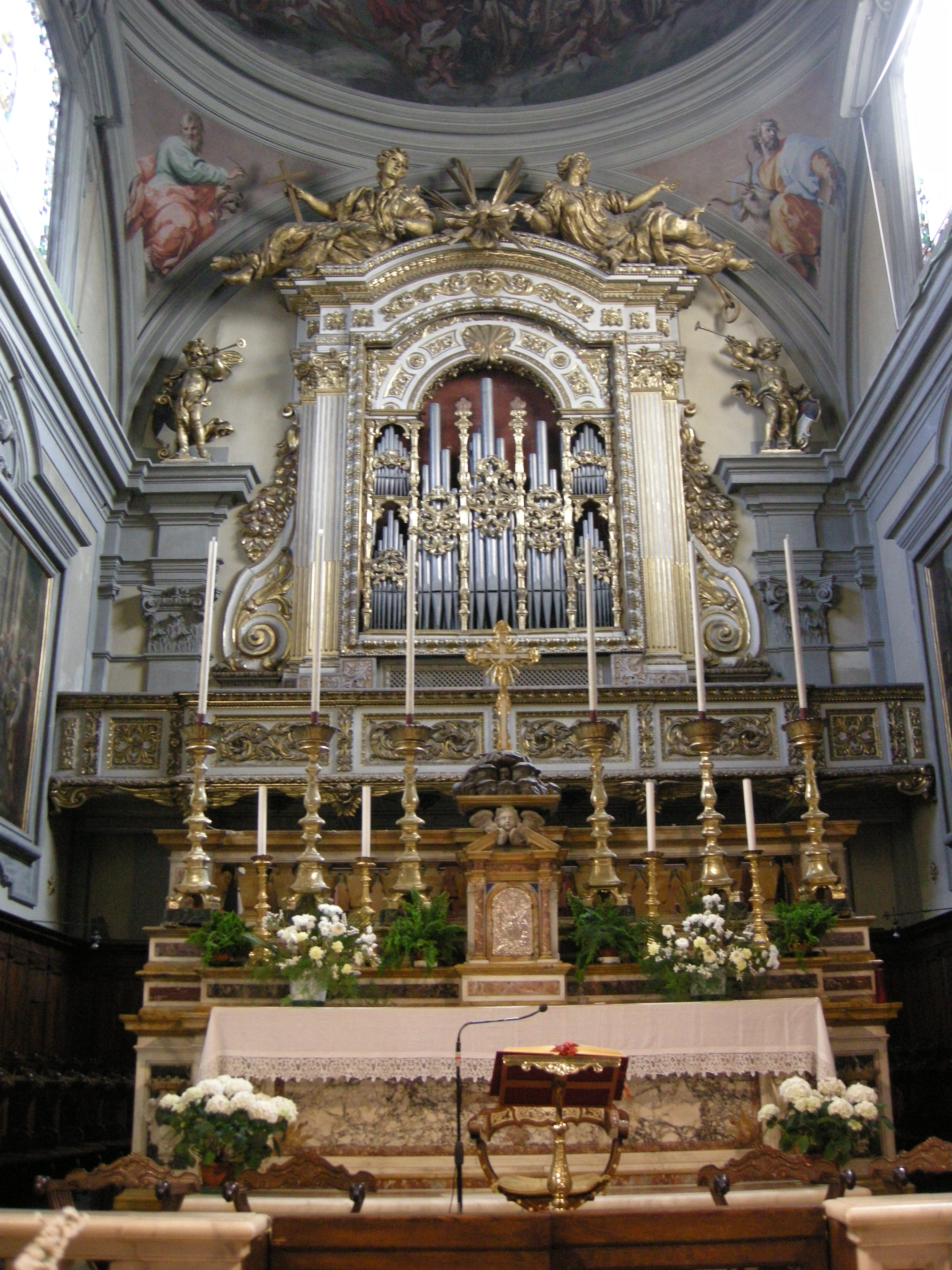 San marco, firenze, altare maggiore